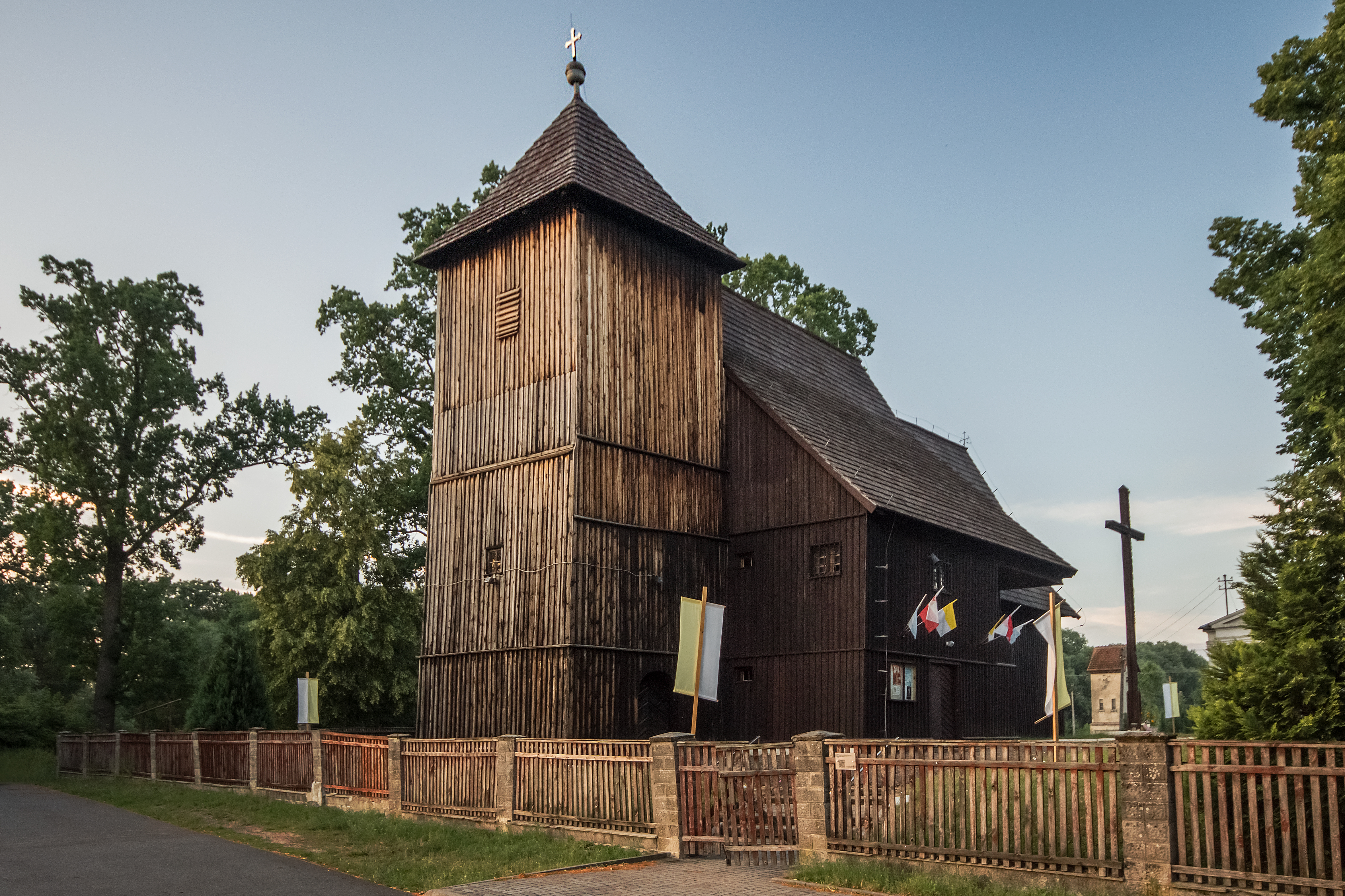 Biskupice, kościół ewangelicki, ob. fil. rzym.-kat. p.w. św. Jana Chrzciciela, 1626, 1777, l. 30-te XX